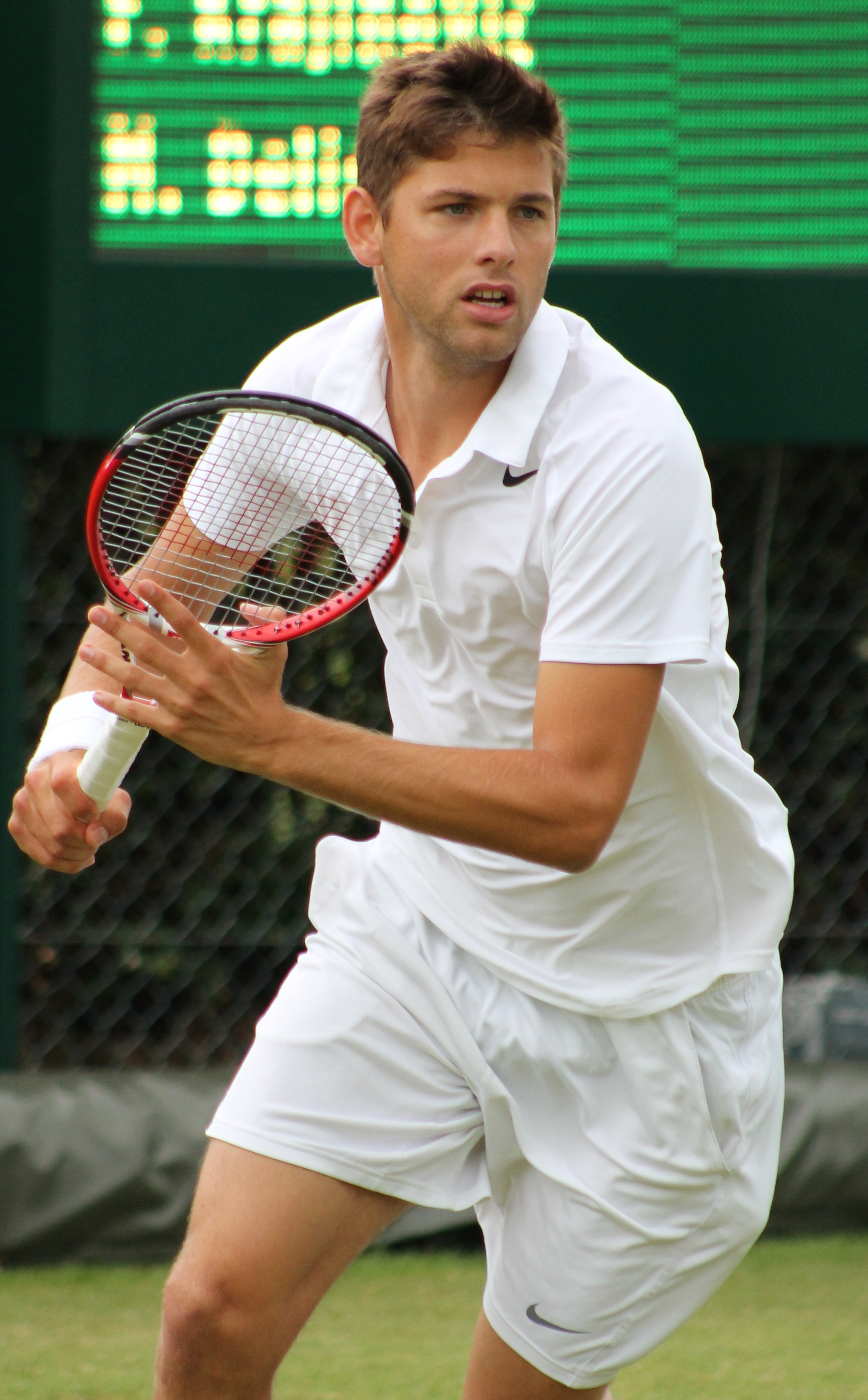 Krajinovic WMQ14 (12)